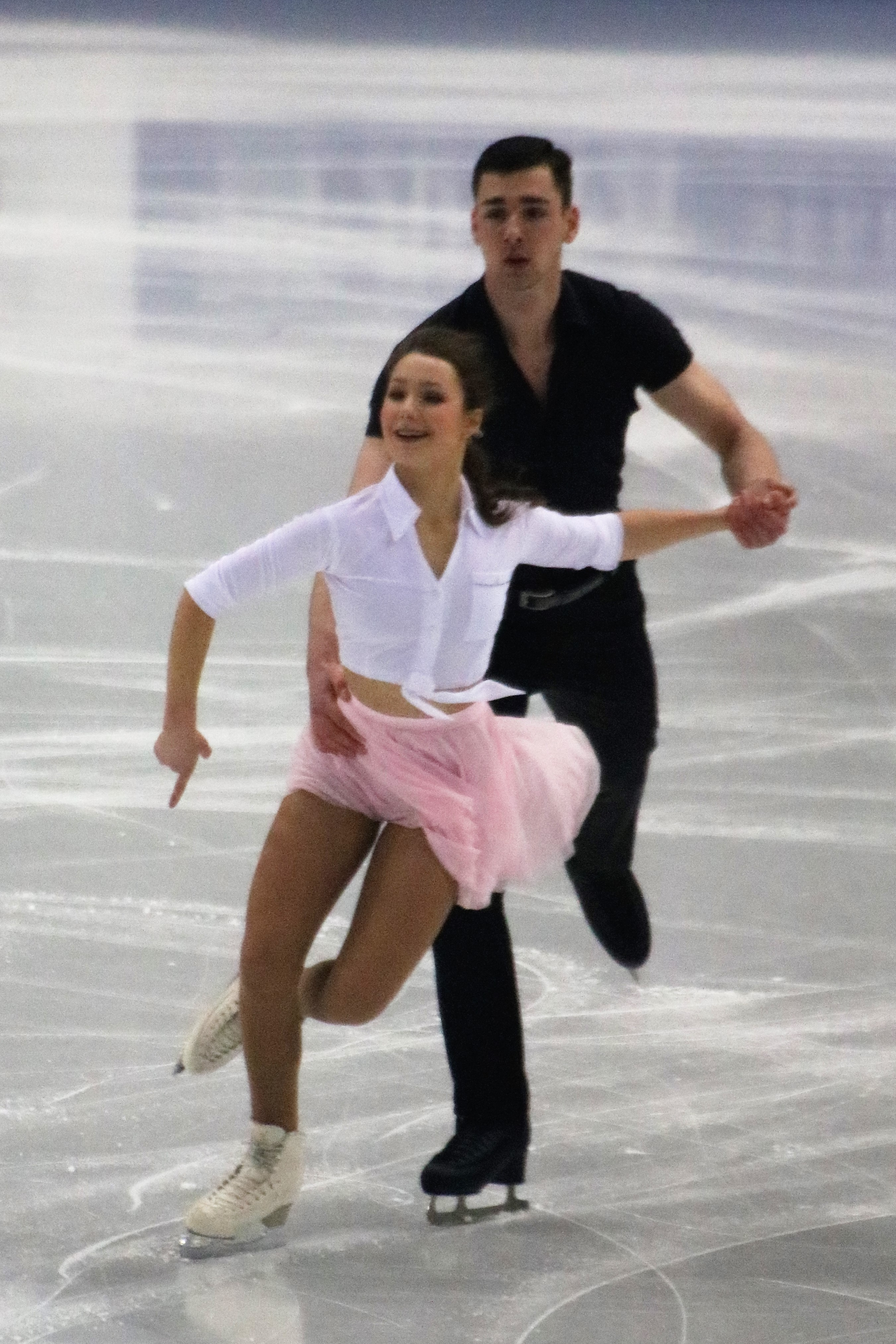 Анника Хокке / Роберт Кункель (Германия) на финале юниорского Гран-при 2019-2020